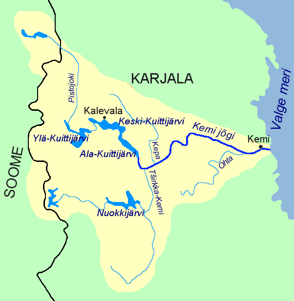 Kemi jõgi